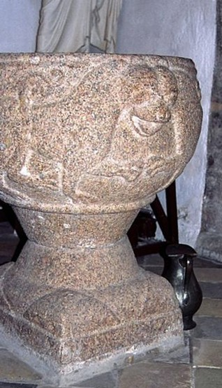 Sønderbæk Kirke, Randers Kommune, døbefont